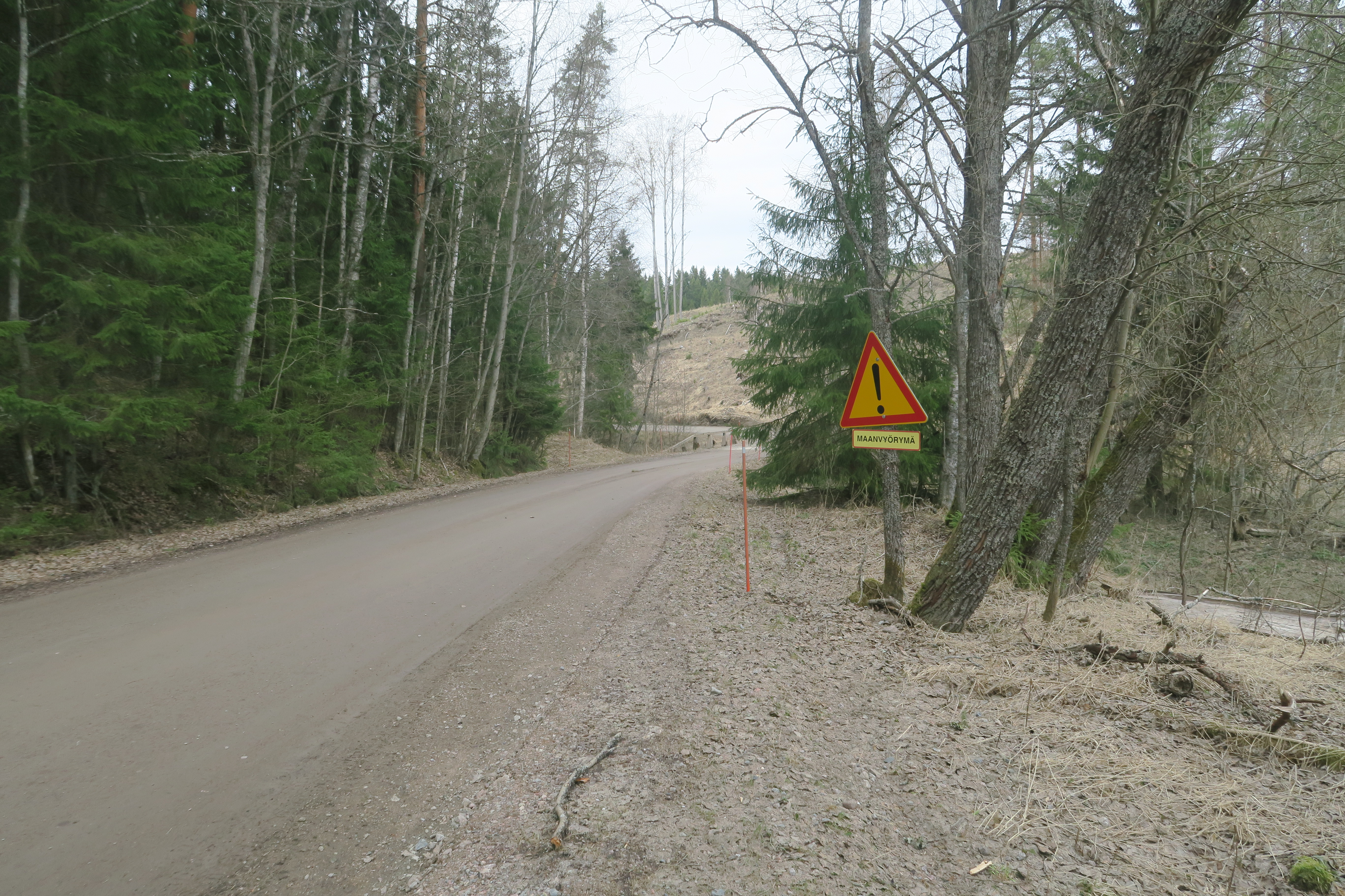 Varoitusmerkki maanvyörymästä Rekijoen varrella Kiikalan Kärkelässä Salossa 22.4.2019.